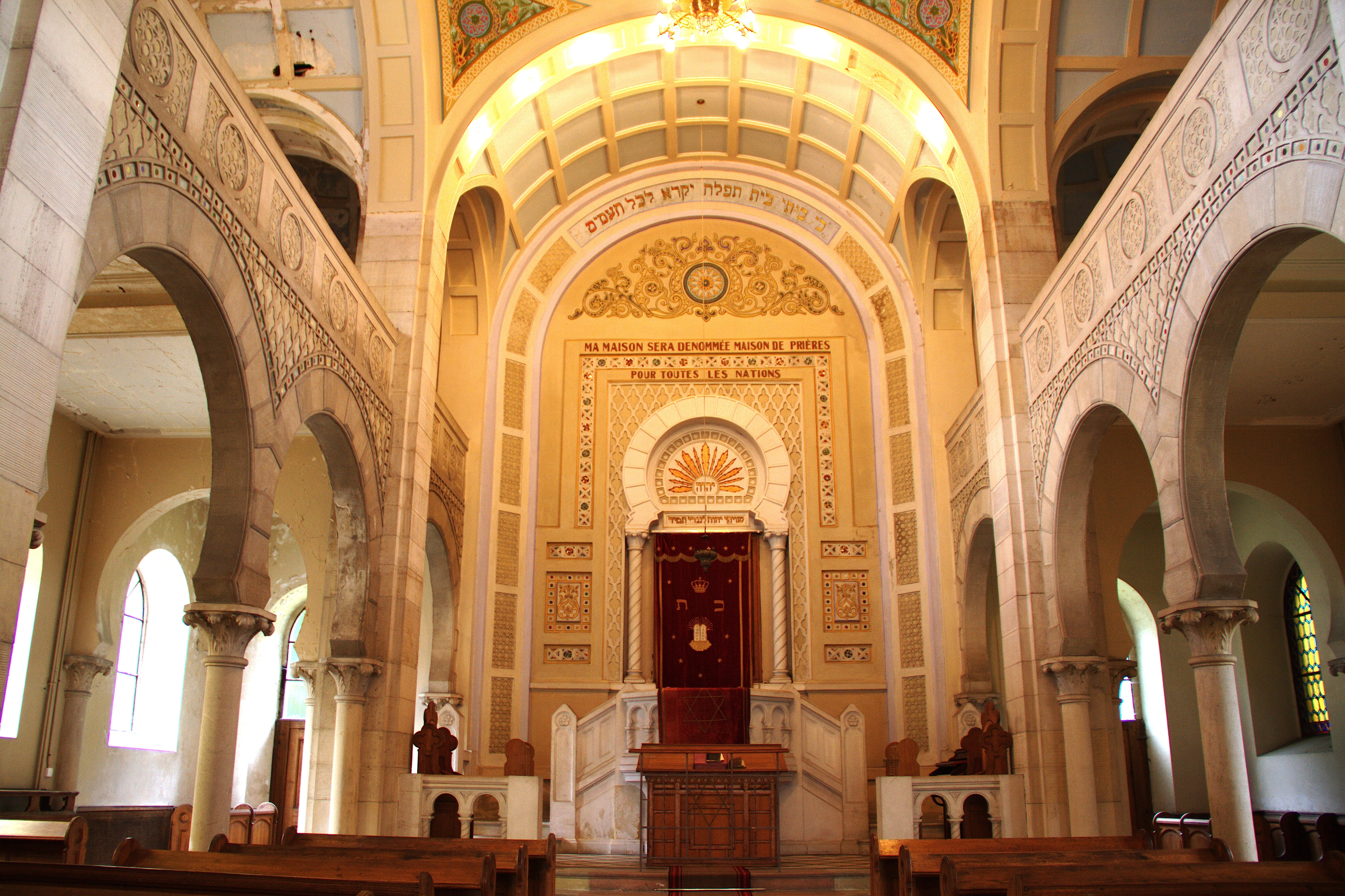 Thann (Haut-Rhin) la synagogue